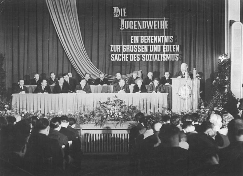 Gera, Jugendweihe, Walter Ulbricht Zentralbild Blumenthal 3.2.1958 Walter Ulbricht sprach in Gera Aus Anlaß des Bezirkstreffens mit Teilnehmern an der Jugendweihe in Gera sprach der 1. Sekretär des ZK der SED Walter Ulbricht am Nachmittag des 2.2.1958 im Konzertsaal des Stadttheaters zu über 1000 Jugendlichen. In den Vormittagsstunden des gleichen Tages führte Walter Ulbricht mit Lehrern, Erziehern und Mitarbeitern der Elternausschüsse eine Aussprache im Haus der Deutsch-Sowjetischen Freundschaft in Gera durch. (Näheres siehe ADN-Meldung) UBz: Blick in den Saal des Hauses der Deutsch-Sowjetischen Freundschaft während der Aussprache.